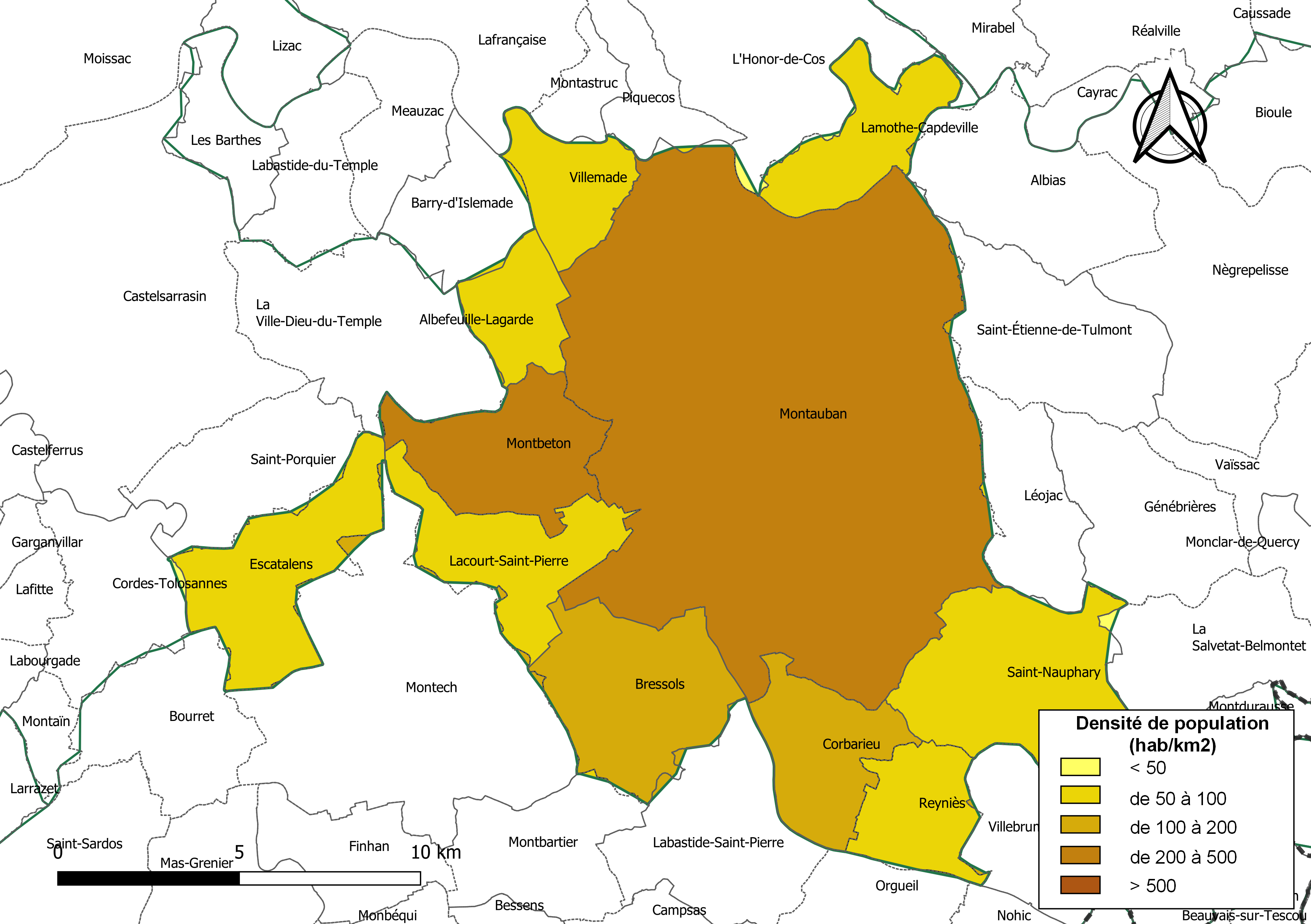 Carte des densités de population (millésimée 2016) des communes de l'intercommunalité Grand Montauban, département de Tarn-et-Garonne, France. Composition au 1er janvier 2019.